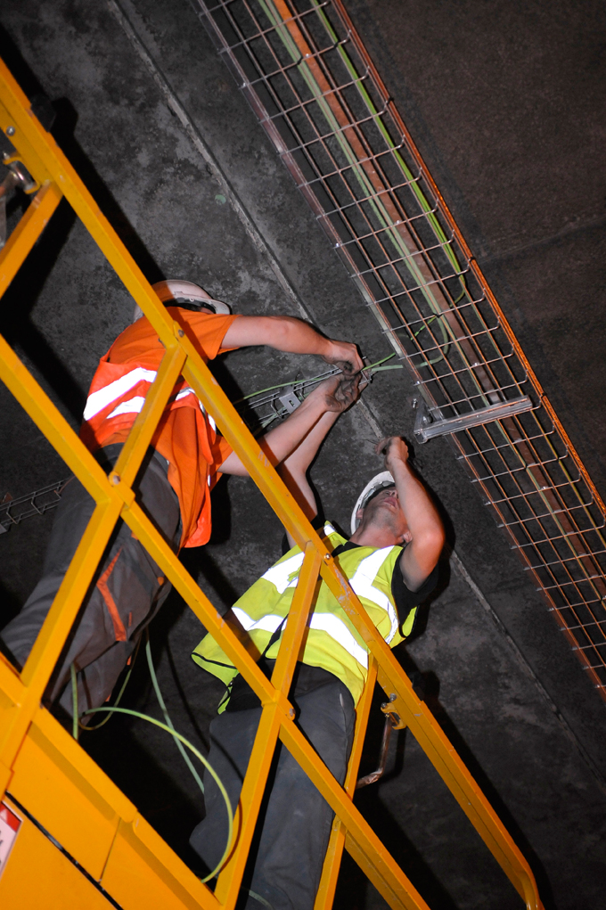 travaux